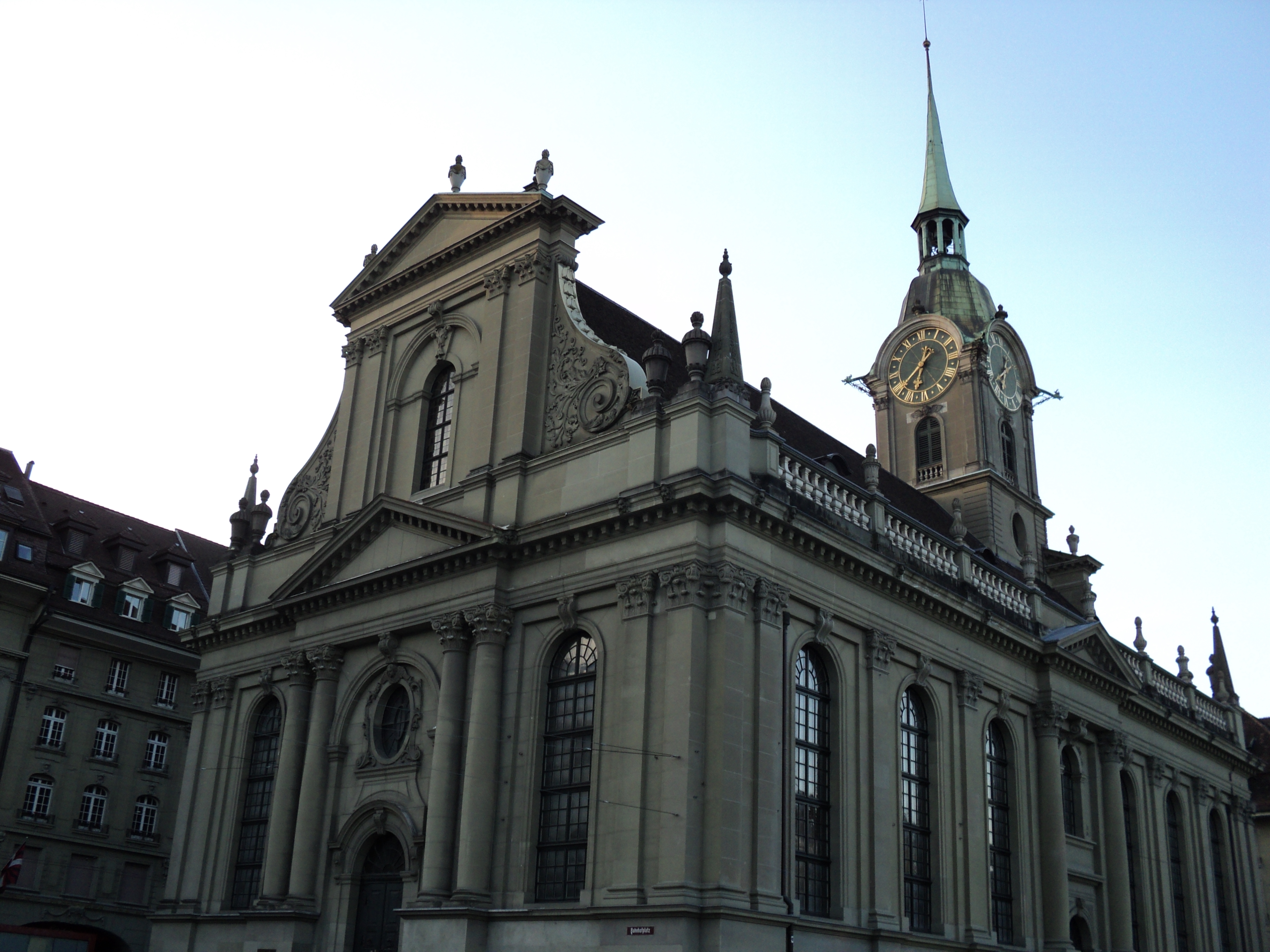 Bern 2012